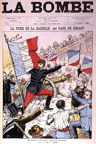 "La Prise de la Bastille" (Le général Boulanger prenant la "Bastille parlementaire").